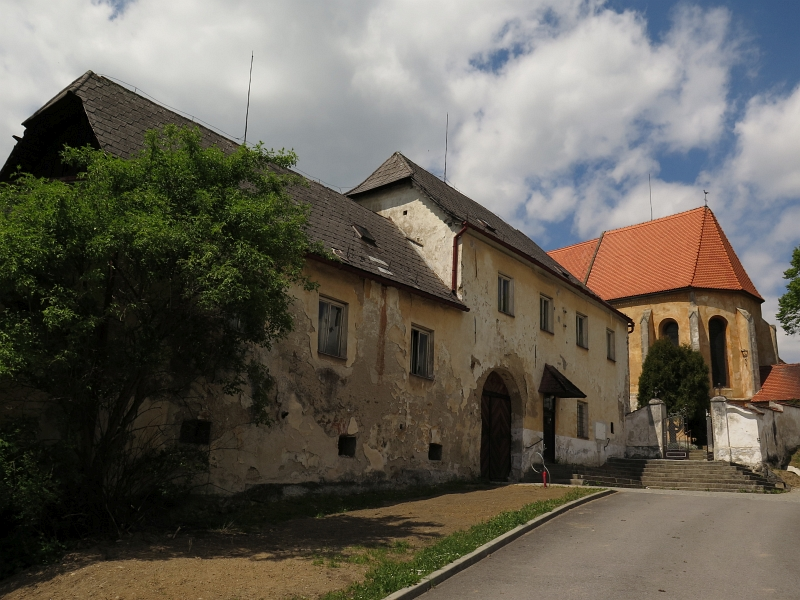 Fara, Malonty 25, u kostela, poblíž návsi, Malonty.